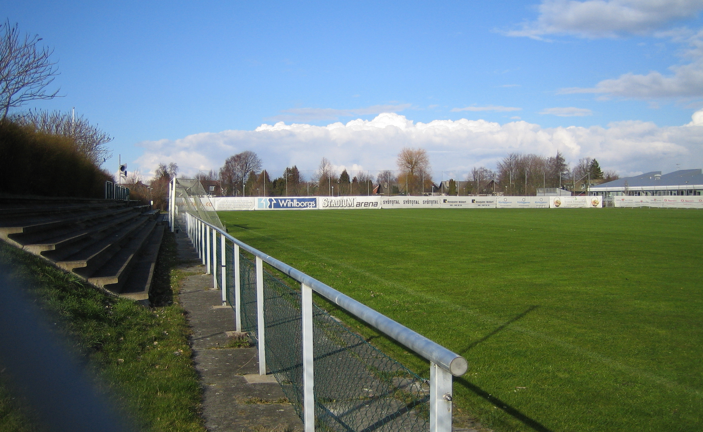 Brovallen fotball stadium in Bunkeflostrand, Malmö, Sweden